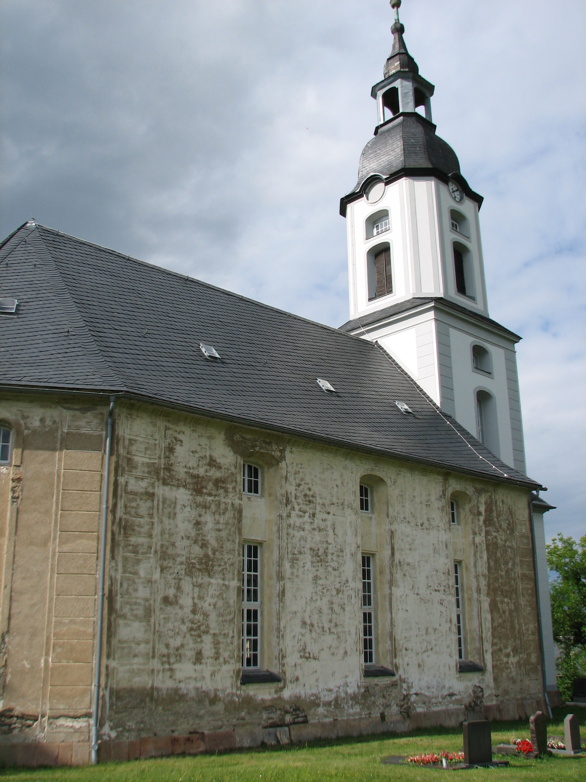 Die teilsanierte Kirche Döhlen im Juni 2017